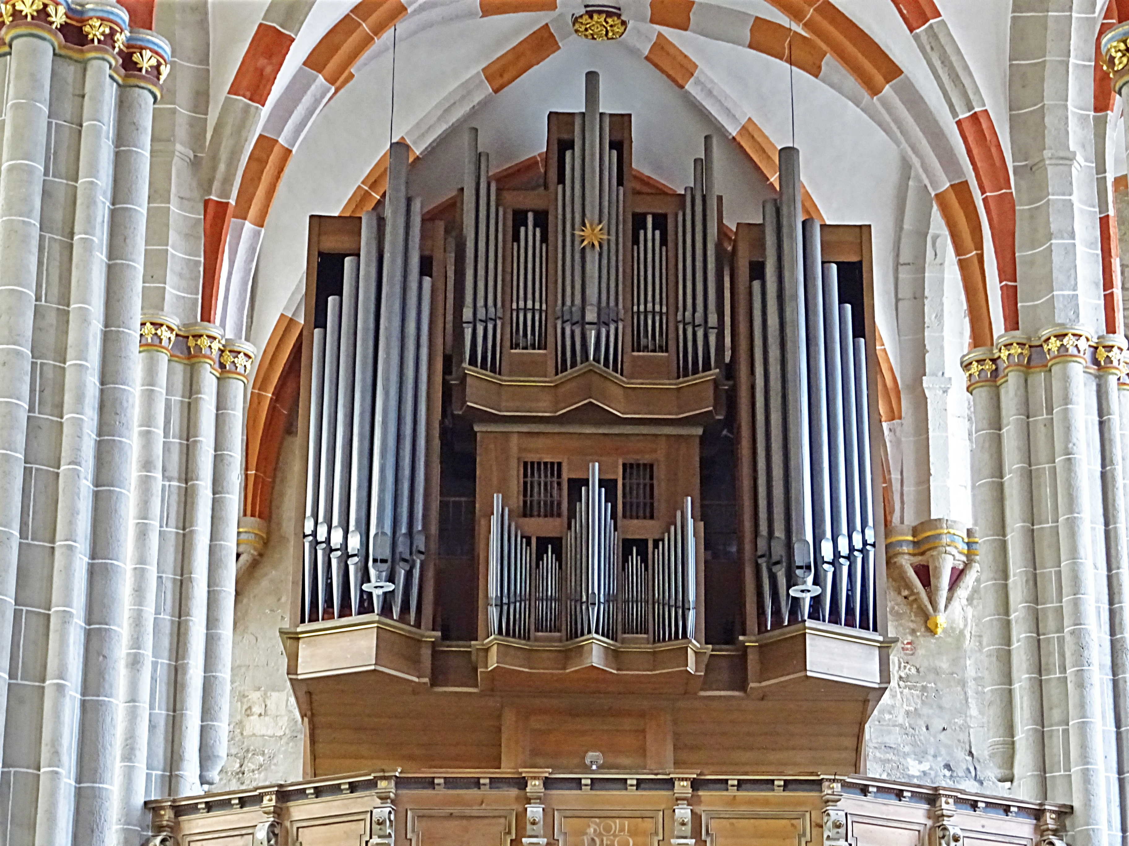 Orgel von Alexander Schuke (1958, Opus 293 III/P42) auf der Westempore der Divi-Blasii-Kirche (Mühlhausen, Thüringen)